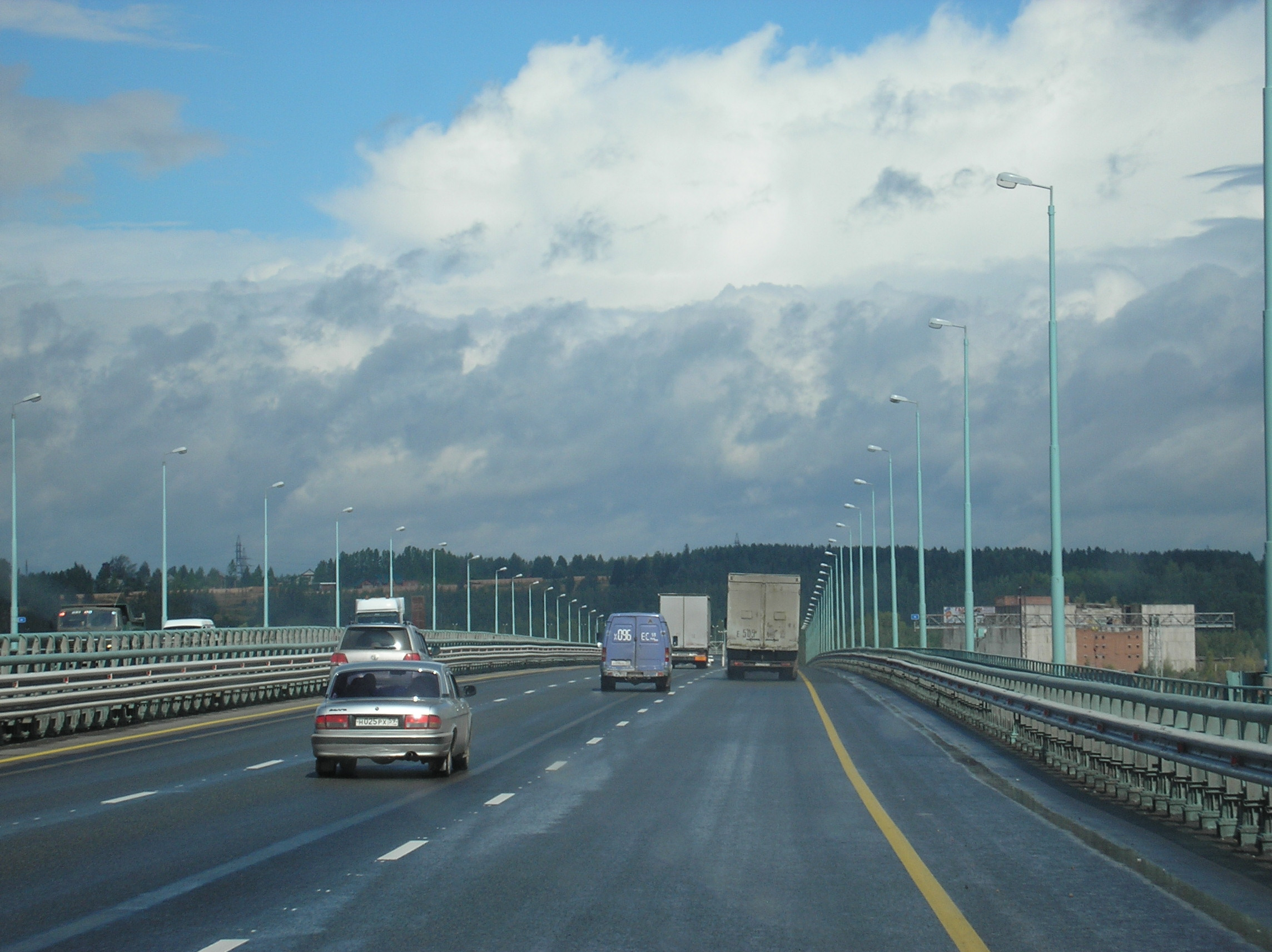 Красавинский мост через Каму